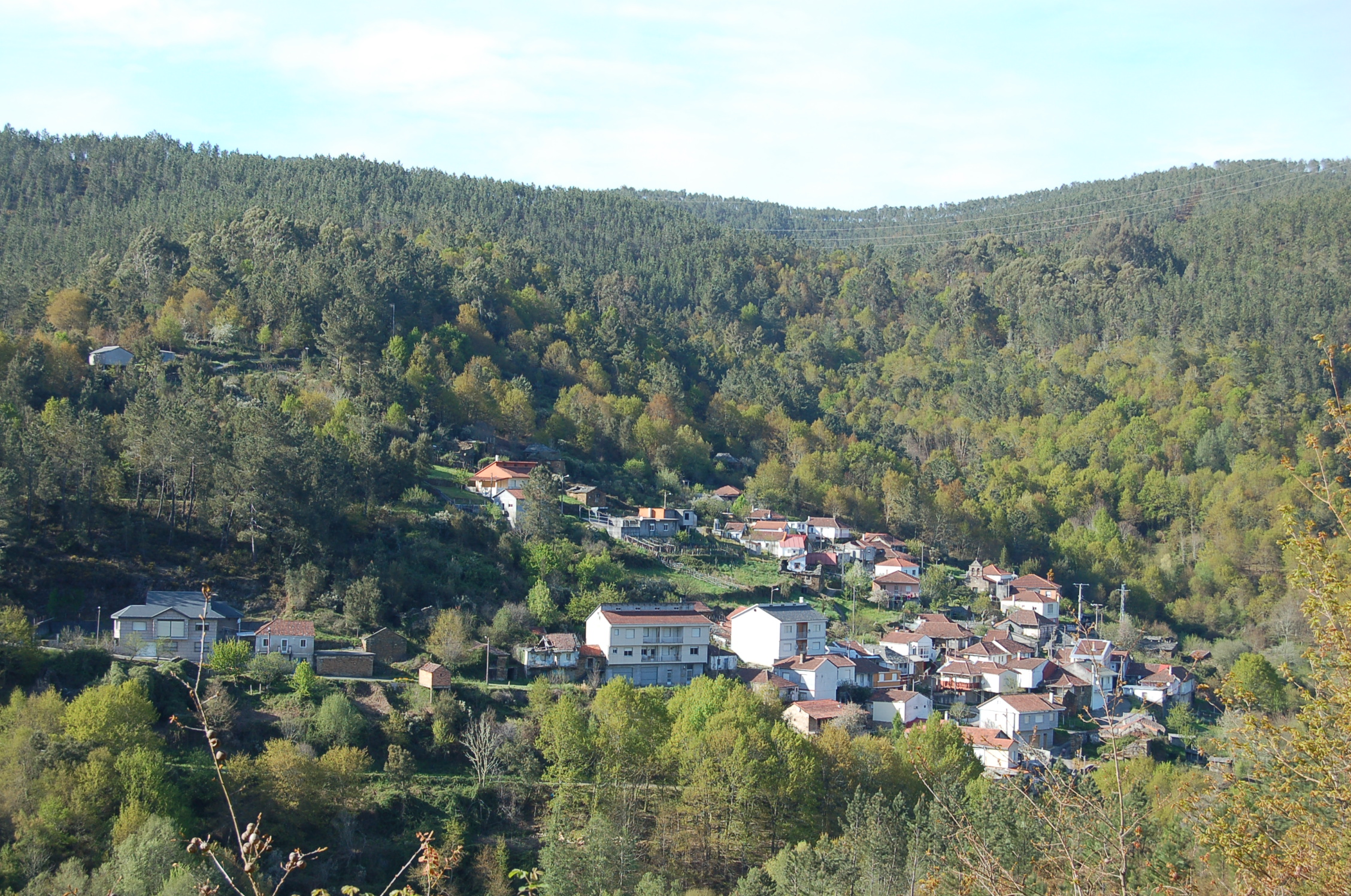 Vista da aldea de Cardelle, no concello de Boborás. Imaxe tomada desde a estrada que baixa de Córcores